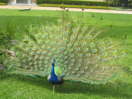 Pavo cristatus